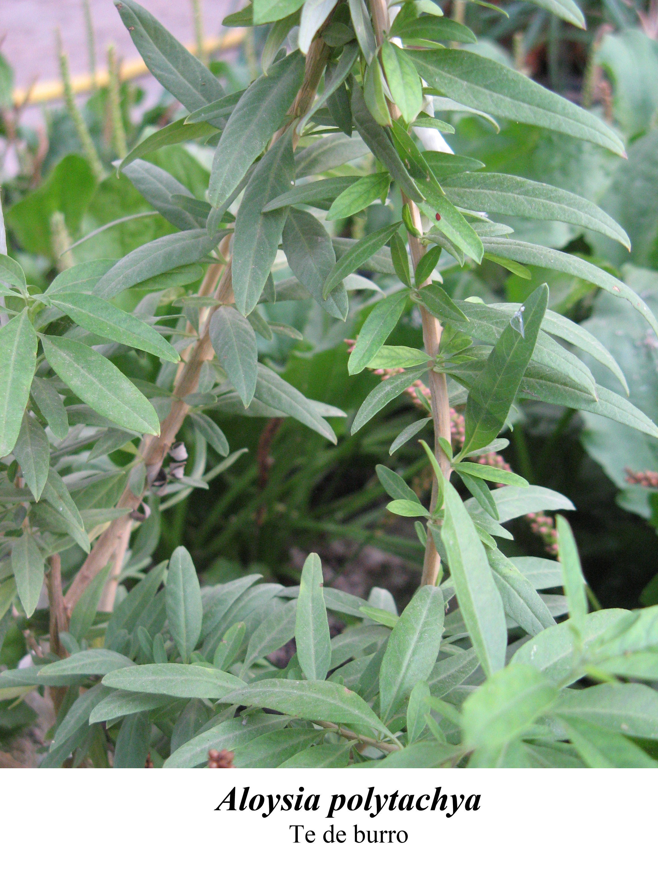 planta medicinal